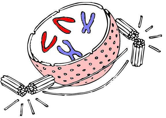 Prophase de la mitose cellulaire au niveau du noyau